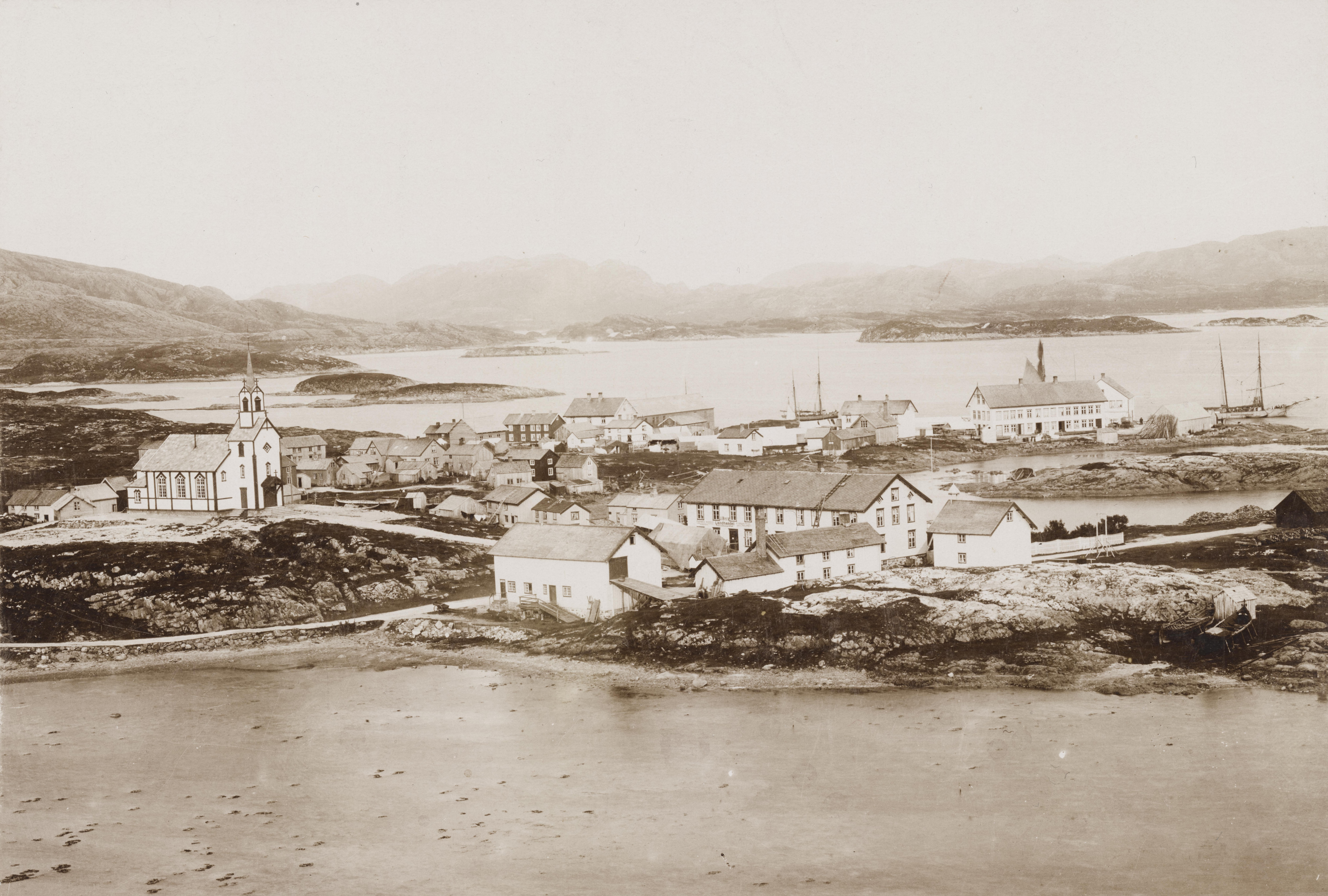 Rørvik i Vikna, kirken med nærmeste bebyggelse. Dateringen er basert på at det er trykt "Eneret 1898" på kartongen.